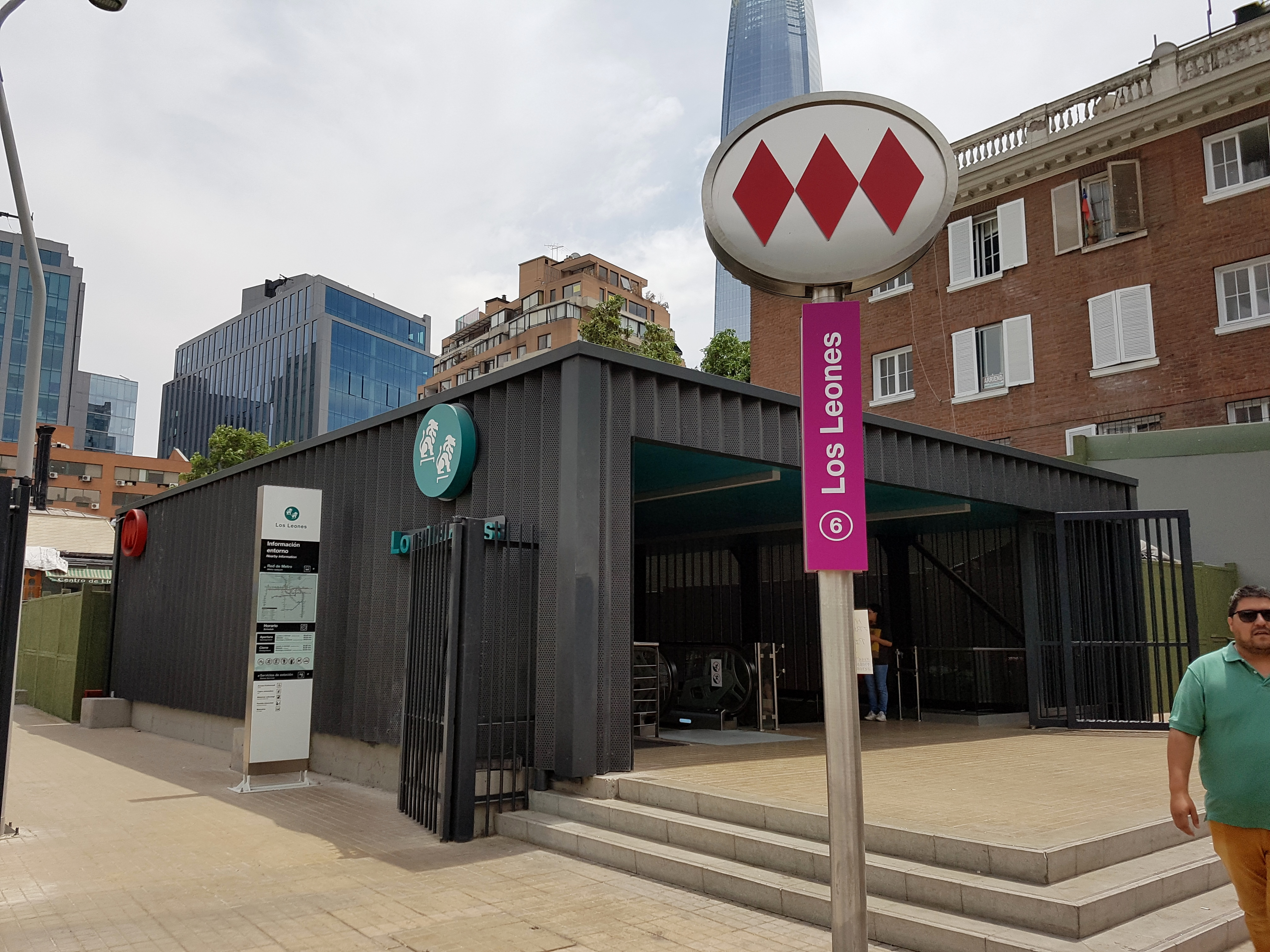 Acceso a la estación Los Leones de la línea 6 del metro de Santiago de Chile .